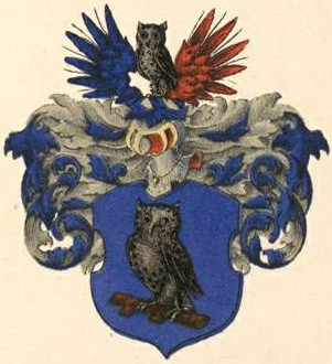 Esseni suguvõsa aadlivapp